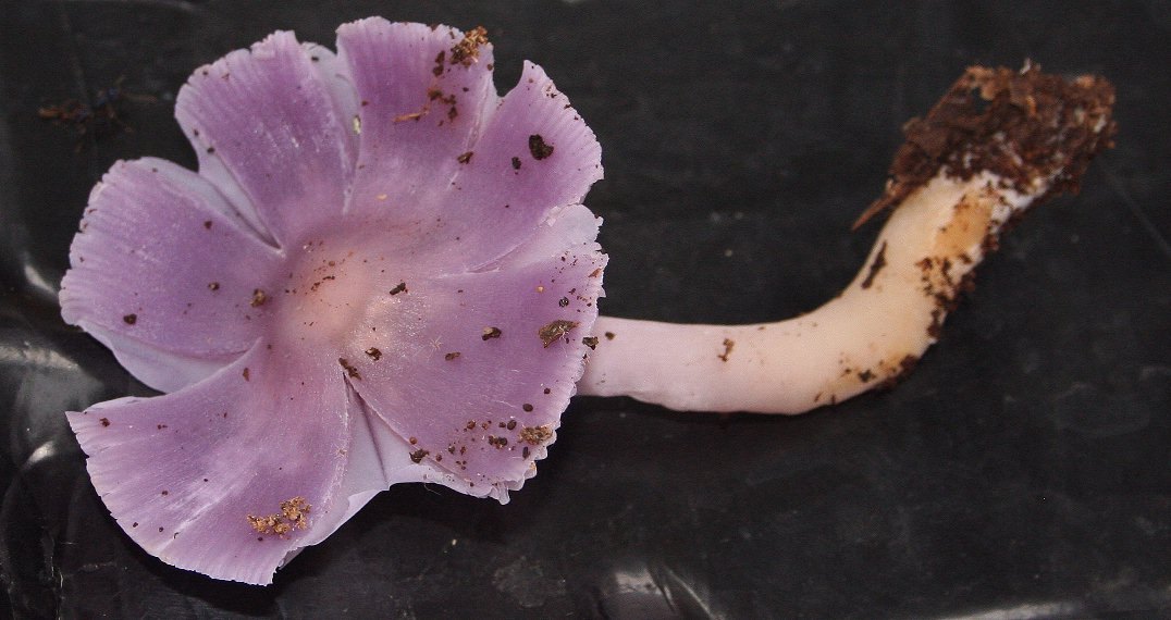 Humidicutis lewelliniae, Hazelbrook, Bleu Mtns NSW